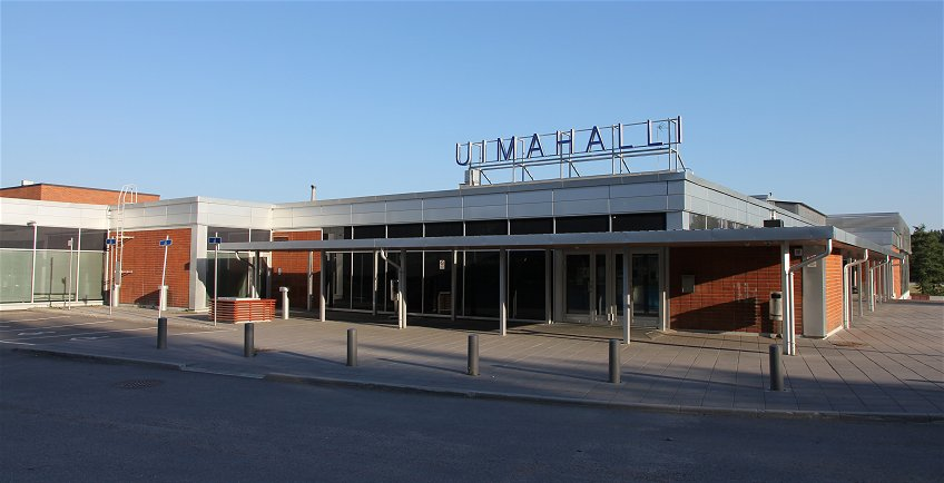 Vantaan Hakunilan uimahalli (kesä 2013). Huom: Muista säilyttää viittaus kuvaajaan, mikäli käytät kuvaa.